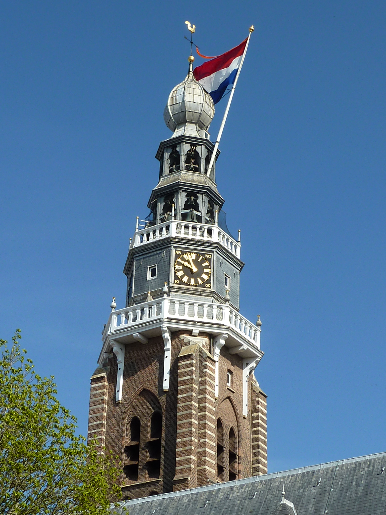 Sint Jacob (Vlissingen)